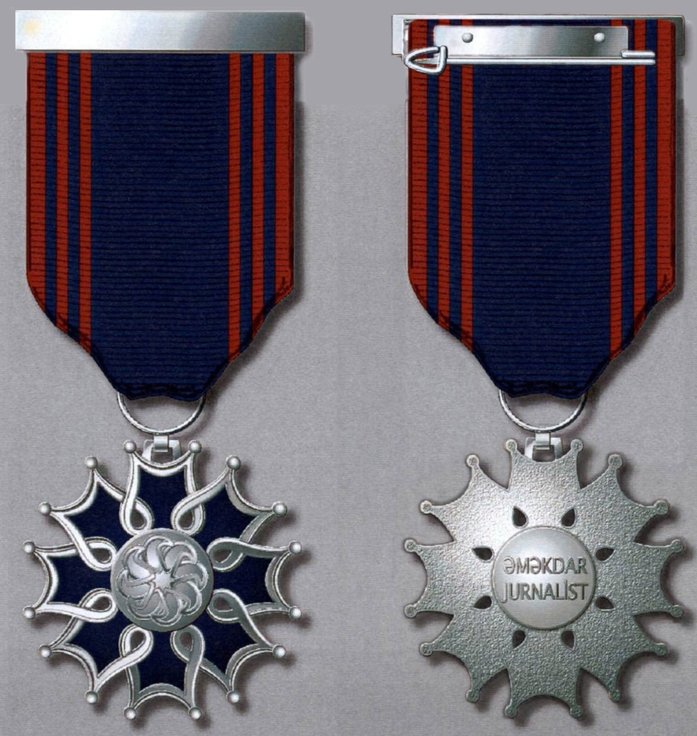 “Əməkdar jurnalist” fəxri adının döş nişanı